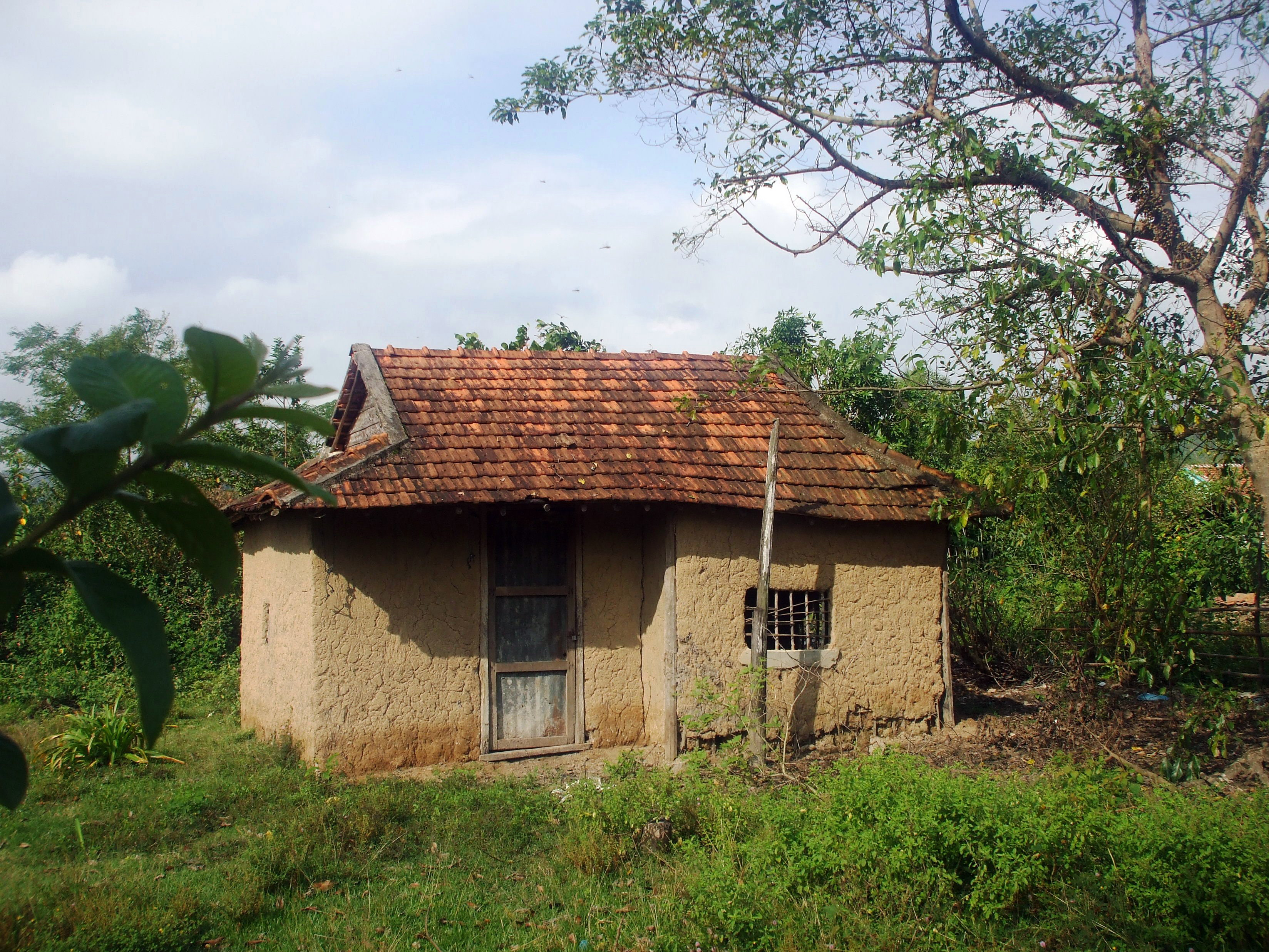 Một nhà ở (mái ngói, vách đất) tại một làng quê ở Bình Định, Việt Nam.